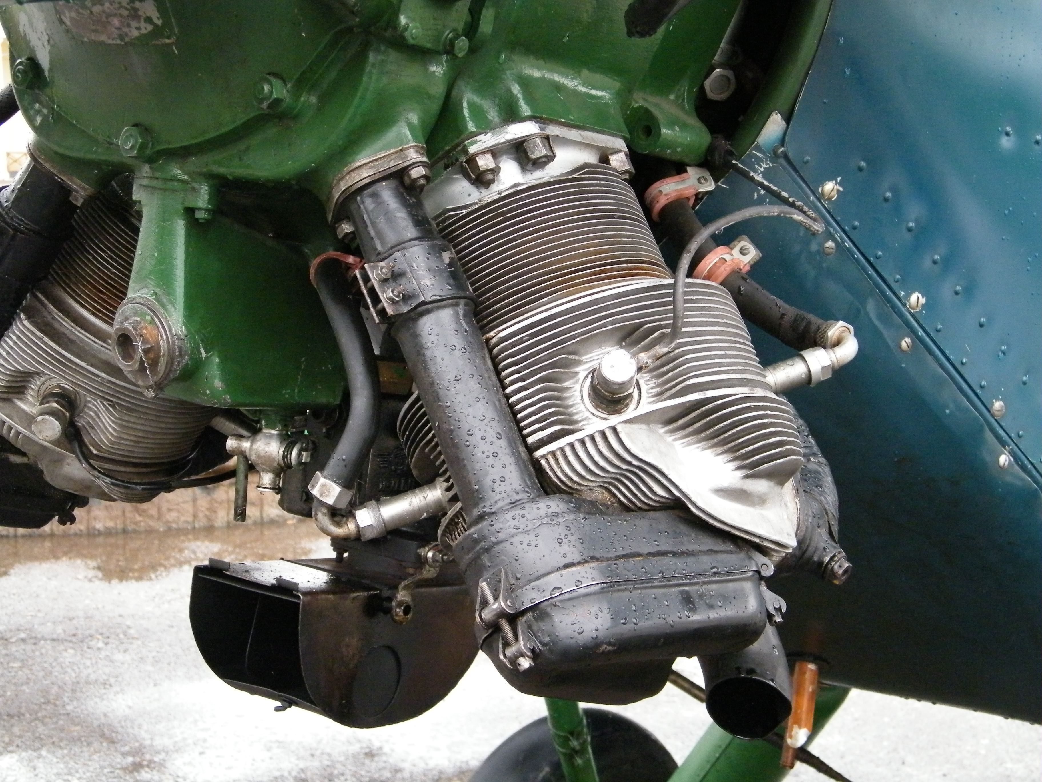 Polikarpov Po-2